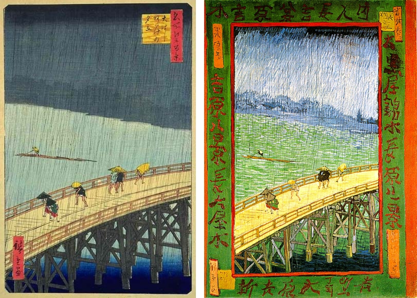 Montage personnel de deux images : un tableau original d'Hiroshige et une copie de Van Gogh. A gauche, Hiroshige "Le pont Ōhashi et Atake sous une averse soudaine" (Evening Shower at Atake and the Great Bridge) : A droite, Van Gogh "Japonaiserie : pont sous la pluie"